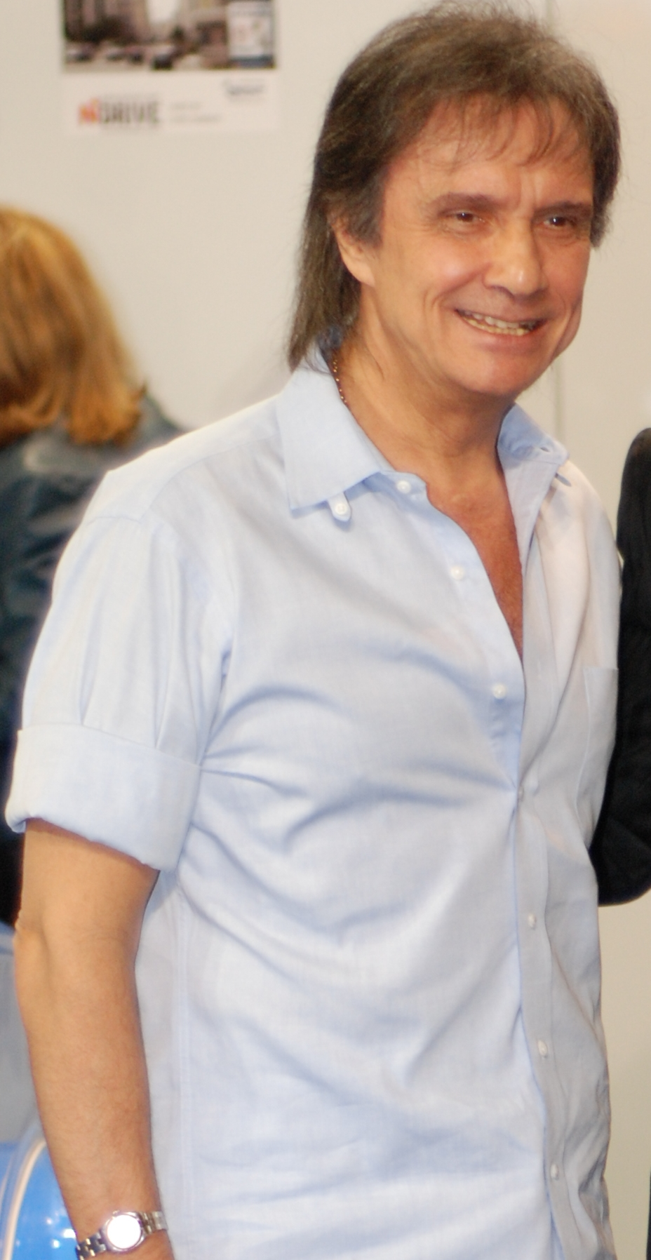 Cantor Roberto Carlos no dia 14 de maio de 2008.